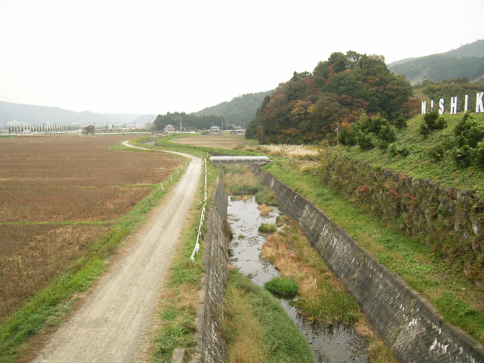 Saikachi River. Sendai, Miyagi Prefecture, Japan.